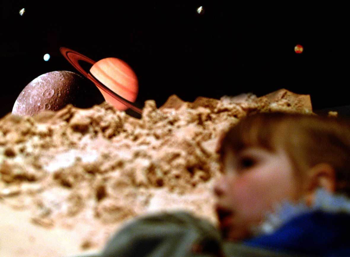 Torun (Poland), Planetarium